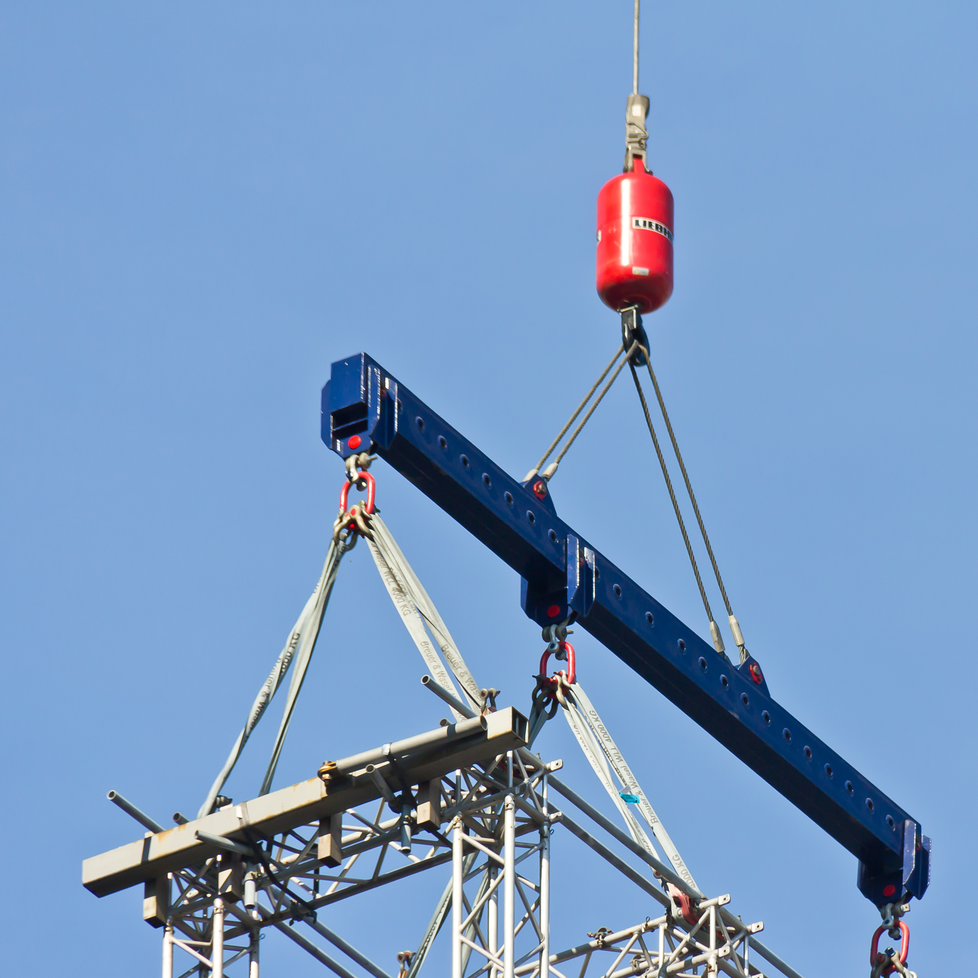 Kölner Dom - Abbau des südöstlichen Gerüstes am Nordturm.Mit Hilfe einer Traverse als Lastaufnahmemittel und Hebebändern als textiles Anschlagmittel (Nenntragfähigkeit (WLL) 4000 kg, Farbcodierung grau) ist ein Gerüstteil am Kranwagen angeschlagen.